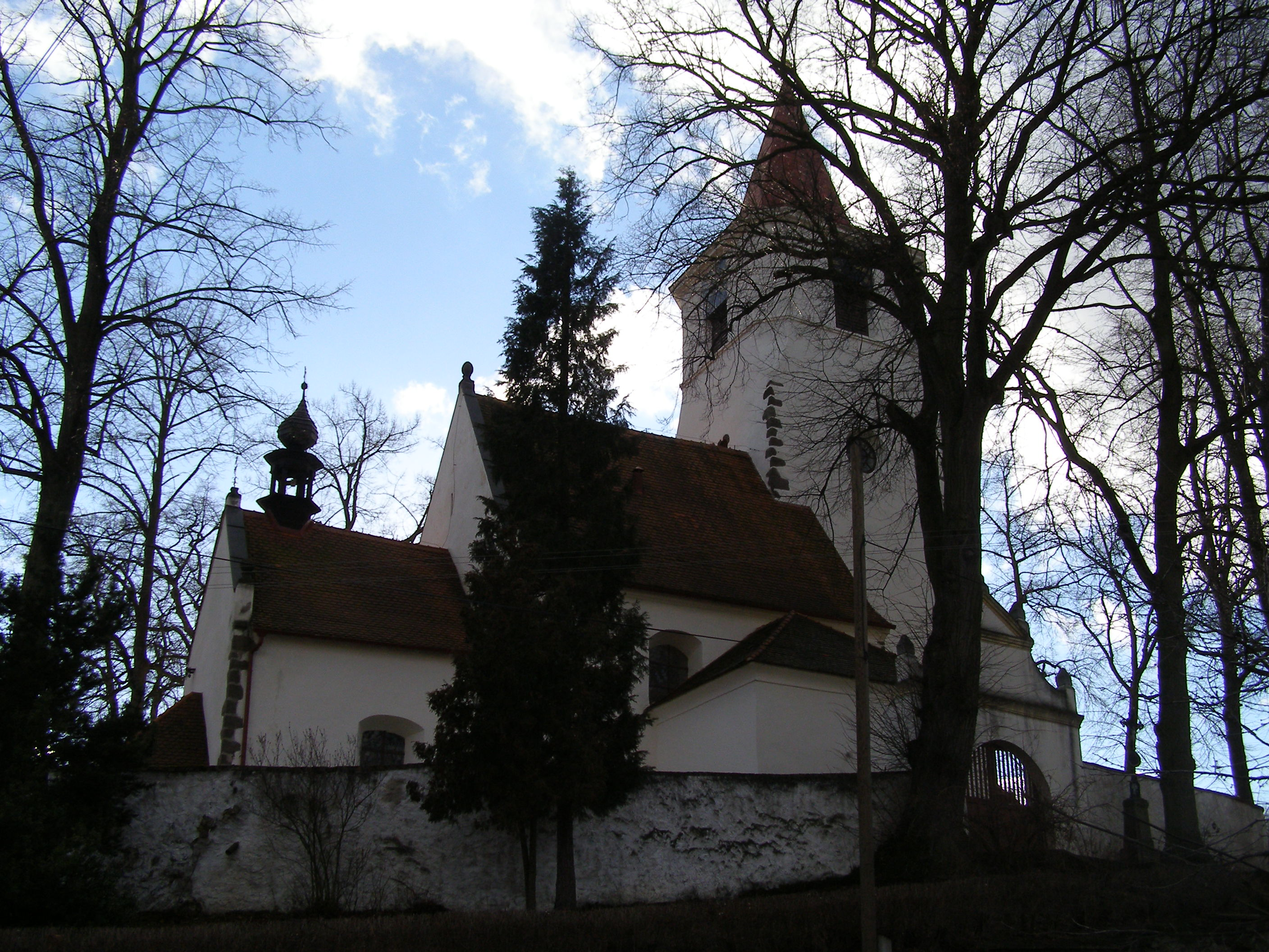 Opravený kostel v roce 2006.